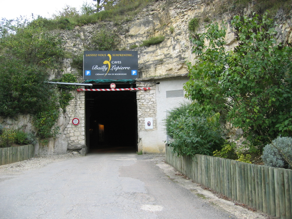 Cave de Bailly Lapierre - Yonne - Bourgogne